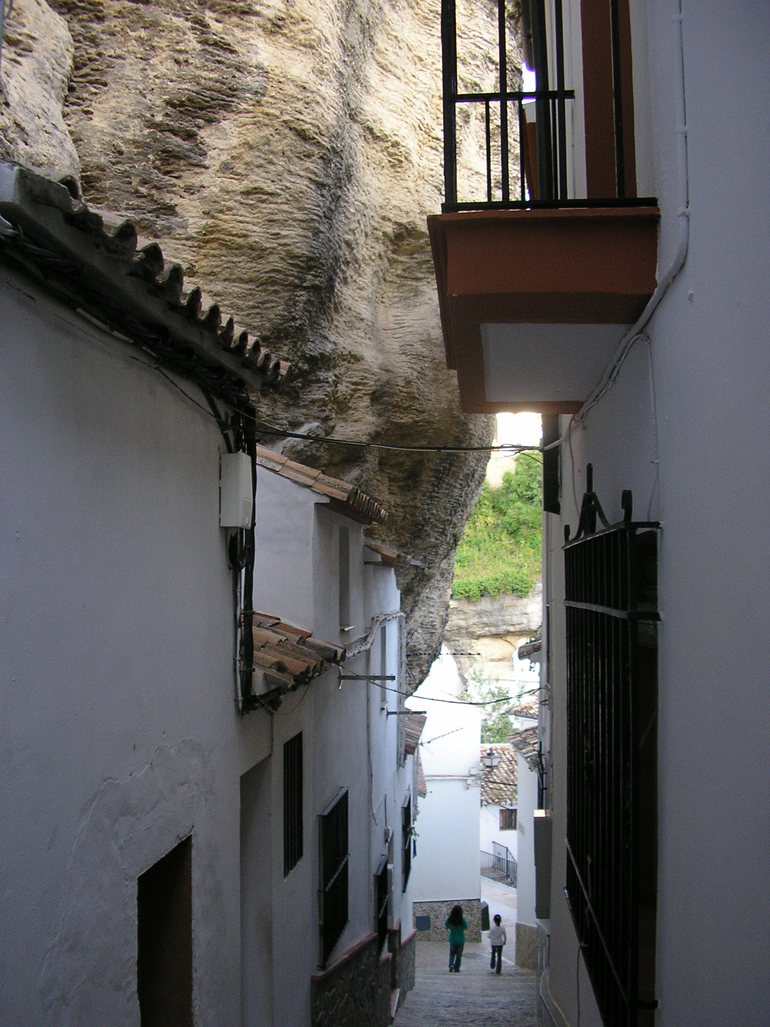 Vista de Setenil de las Bodegas, Andalucía, España.